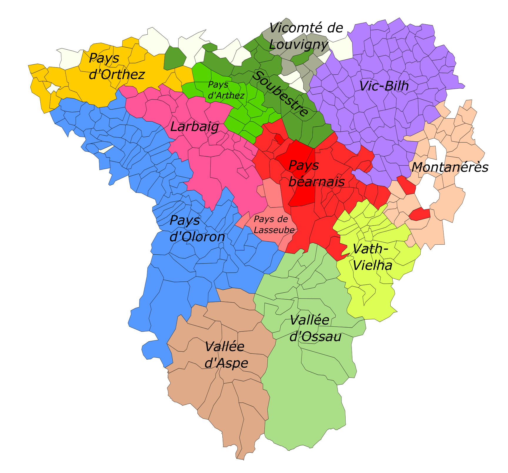 Carte des régions historiques du Béarn